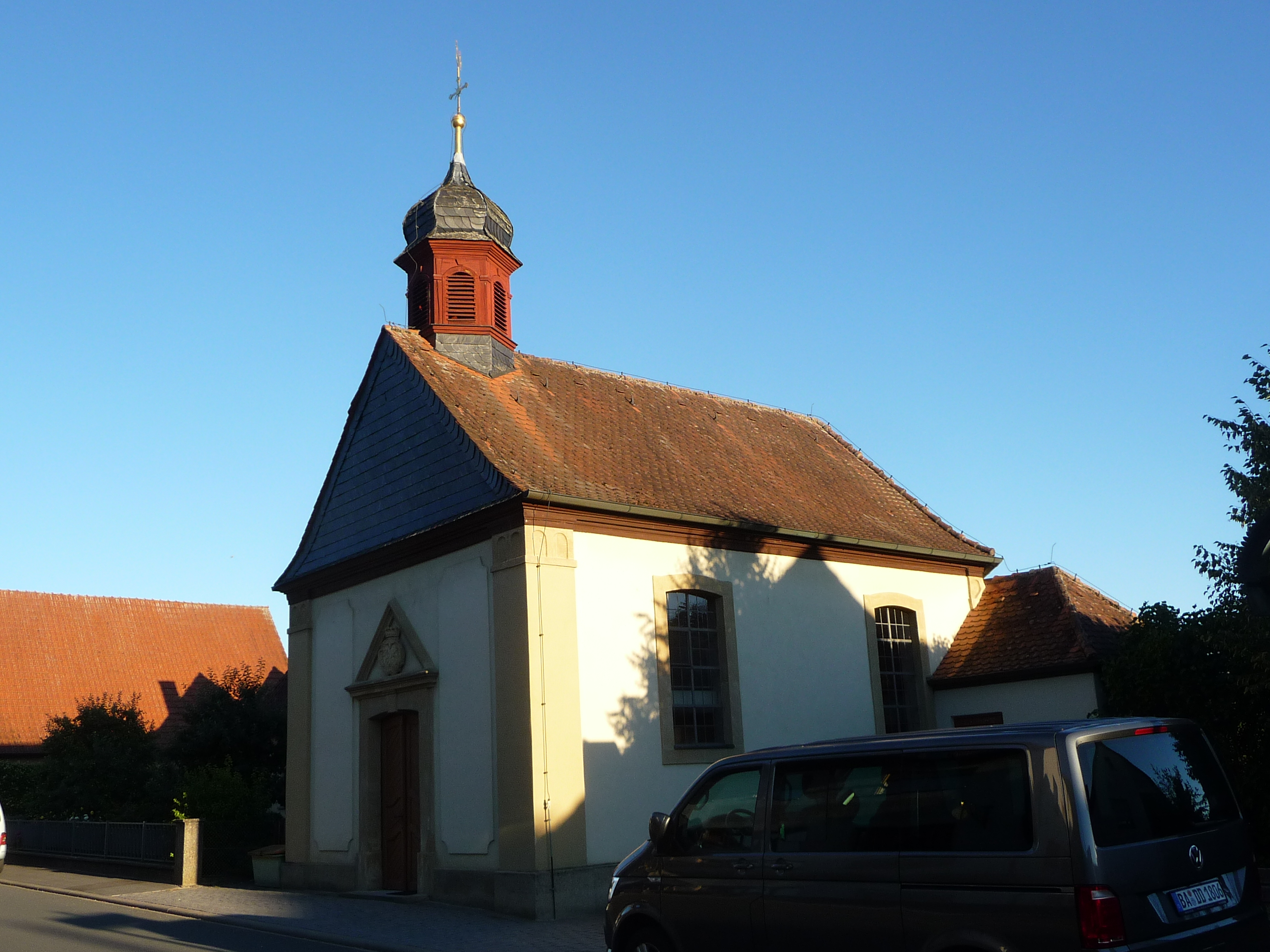 Zückshut ist ein Ortsteil der Gemeinde Breitengüßbach im oberfränkischen Landkreis Bamberg mit etwa 360 Einwohnern.